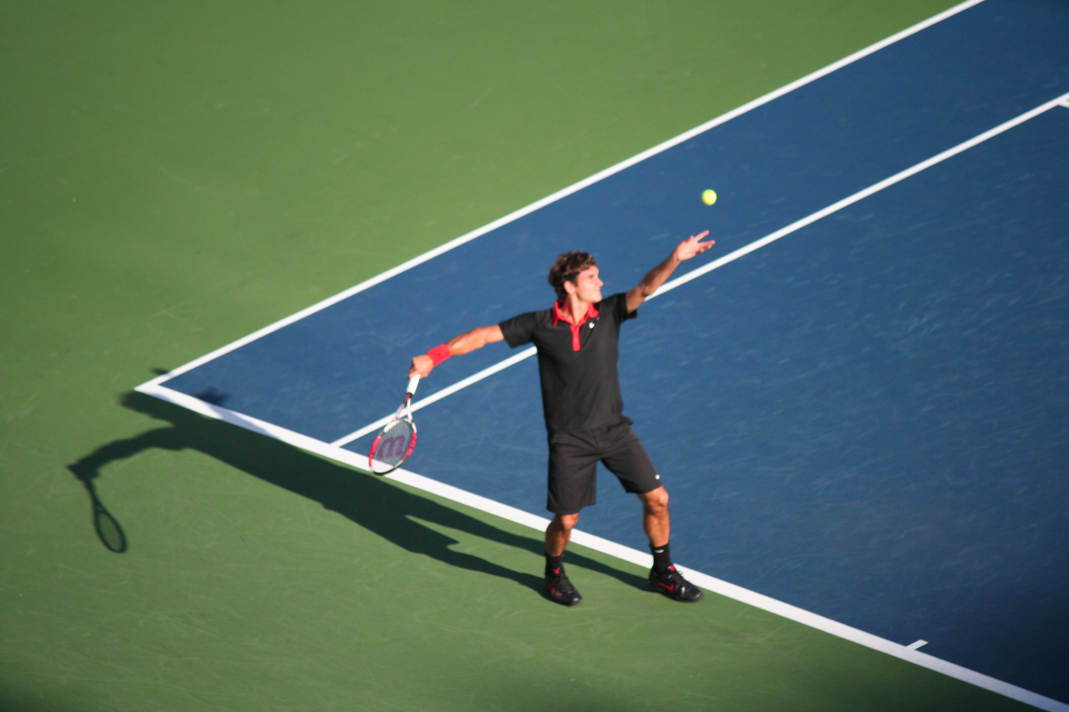 Roger Federer